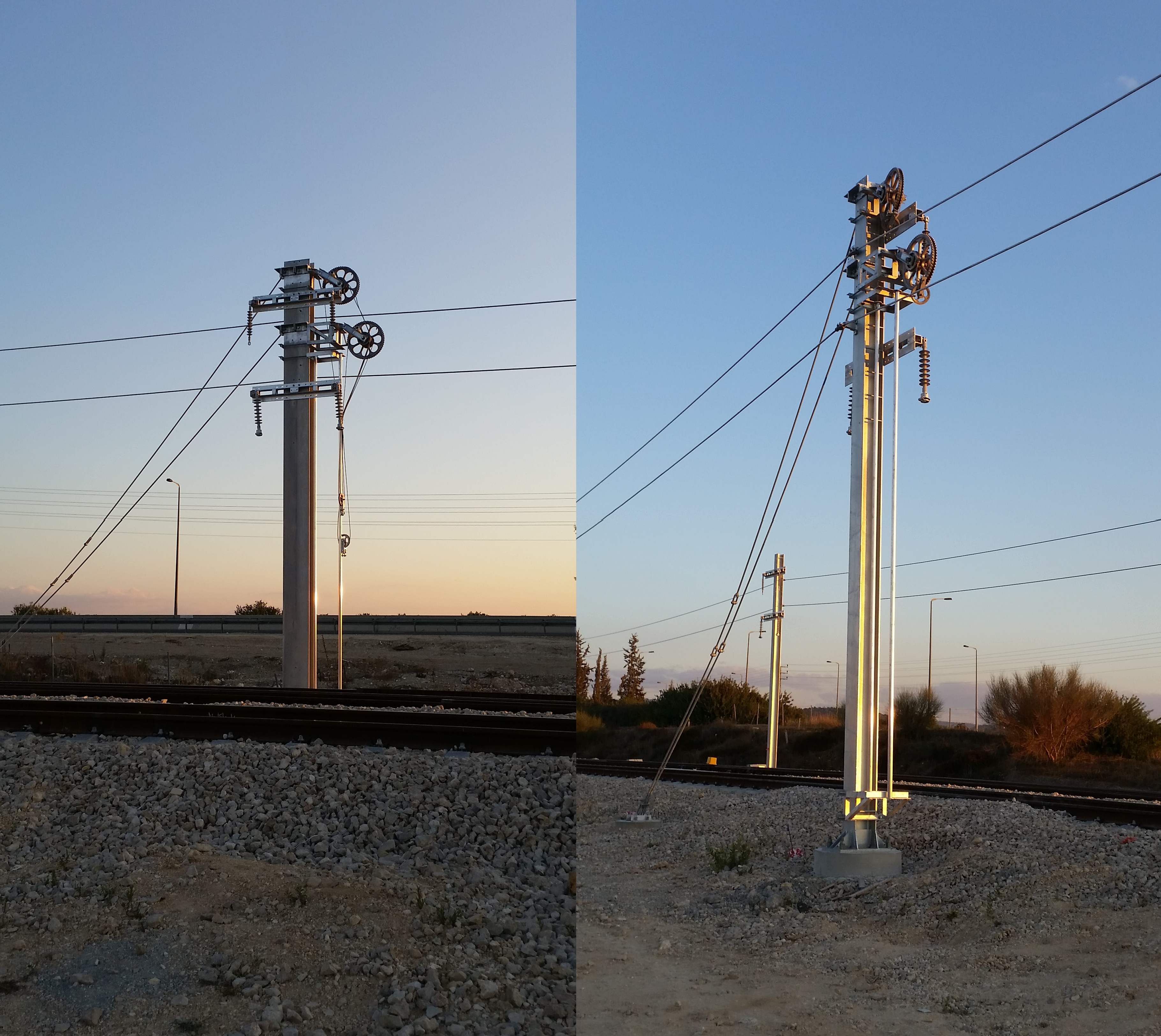 עמוד עם מנגנון מתיחה לקו ההזנה העילי של חישמול הרכבת. צולם באיזור שעלבים.